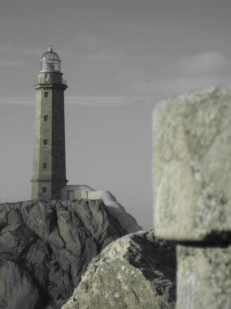 Faro Cabo Vilano, Camariñas